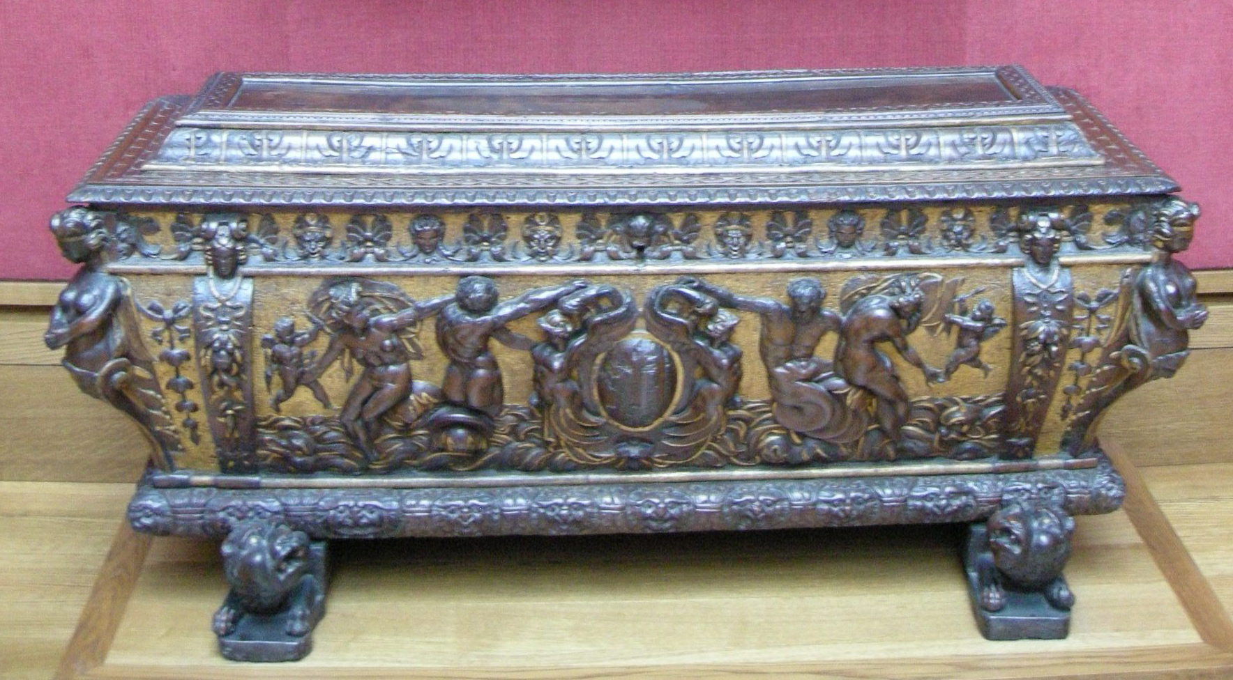 Cassone forse da milano, 1550-1600 ca.